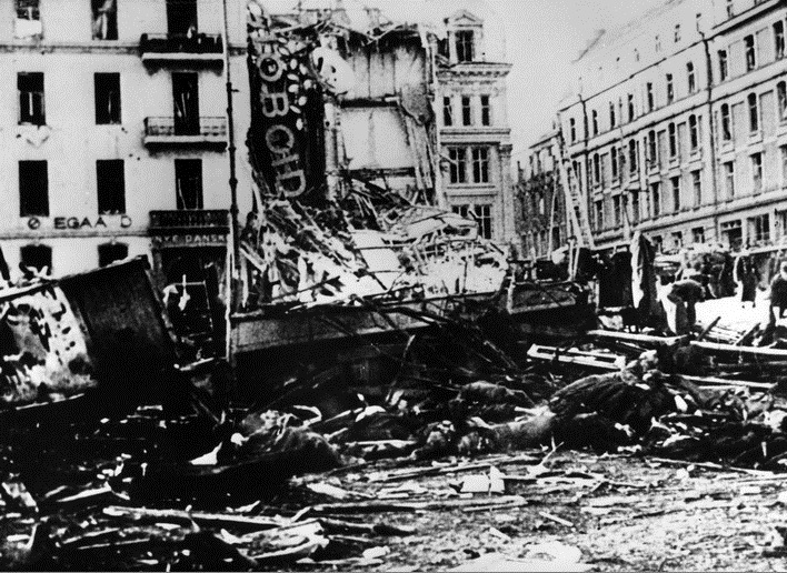 Bombet bygård 31.desember 1944, vrak av sporvogn, brannbil. Bakgrunnen for ødeleggelsen av denne bygården var engelskmennenes forsøk på å bombe tyskokkuperte Victoria Terrasse. Feilbombingen skal ha ført til at mange sivile liv gikk tapt, 55 omkom på trikken som passerte på Drammensveien.